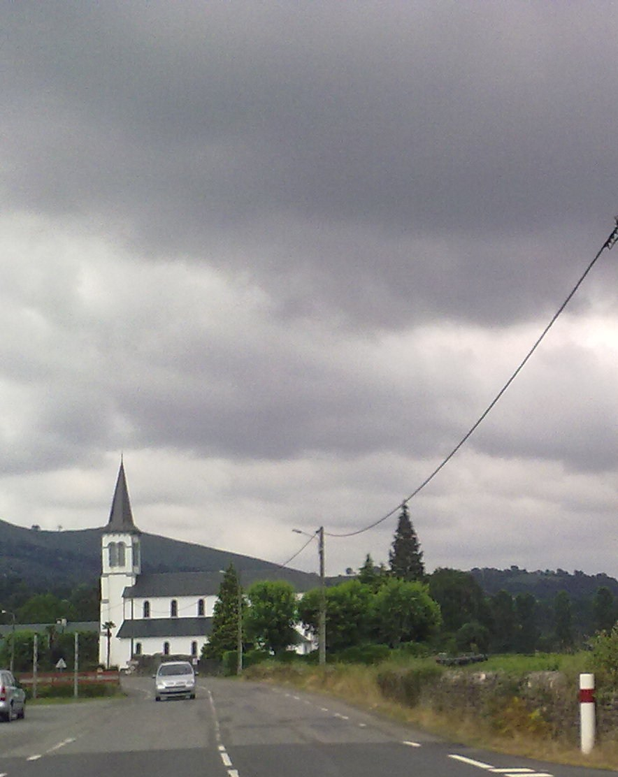 Aramits e 4 juillet 2010.